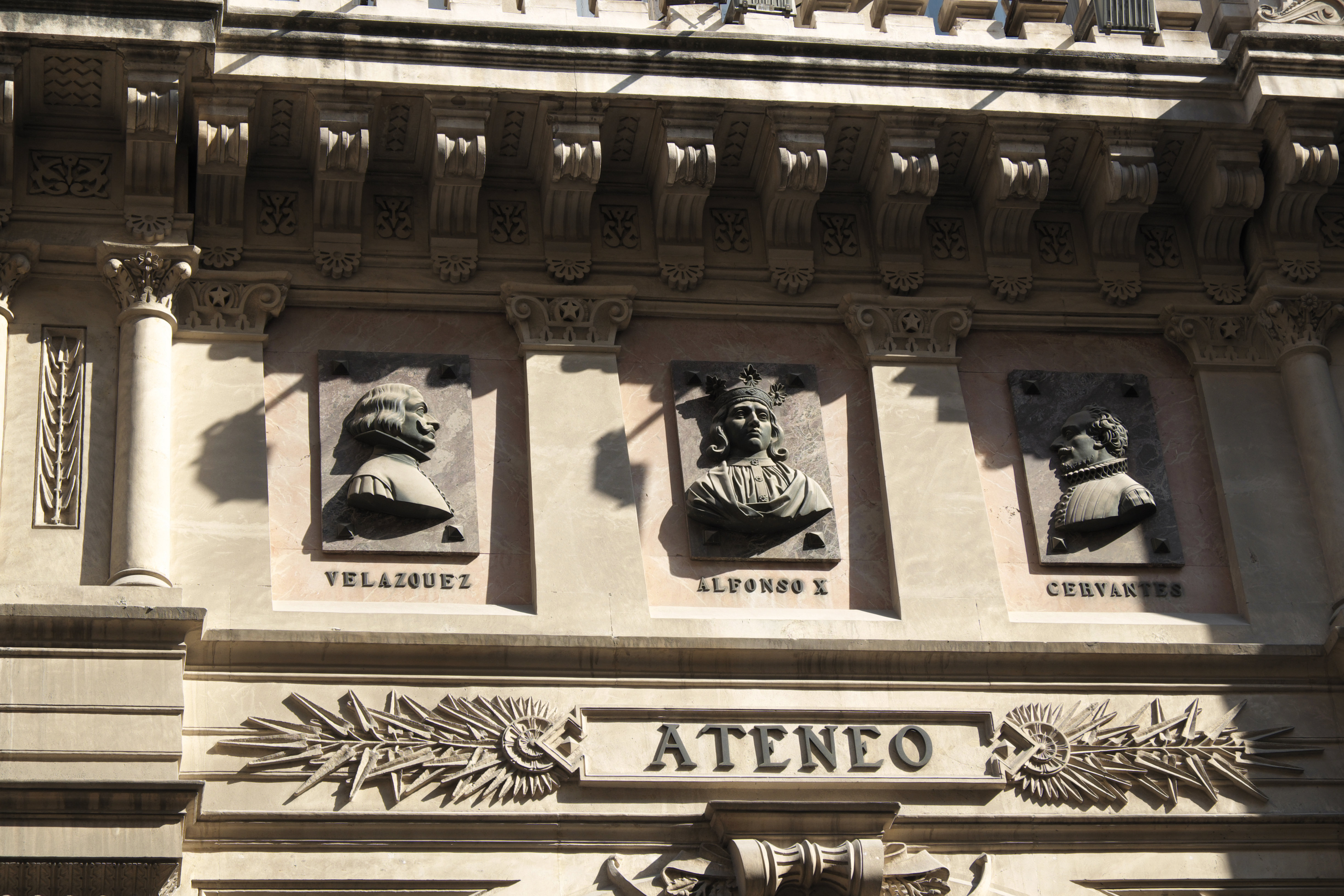 Ateneo de Madrid in der Calle del Prado in Madrid (Spanien), mit den Portaitbüsten von Velazquez, Alfons X. und Cervantes über dem Eingang